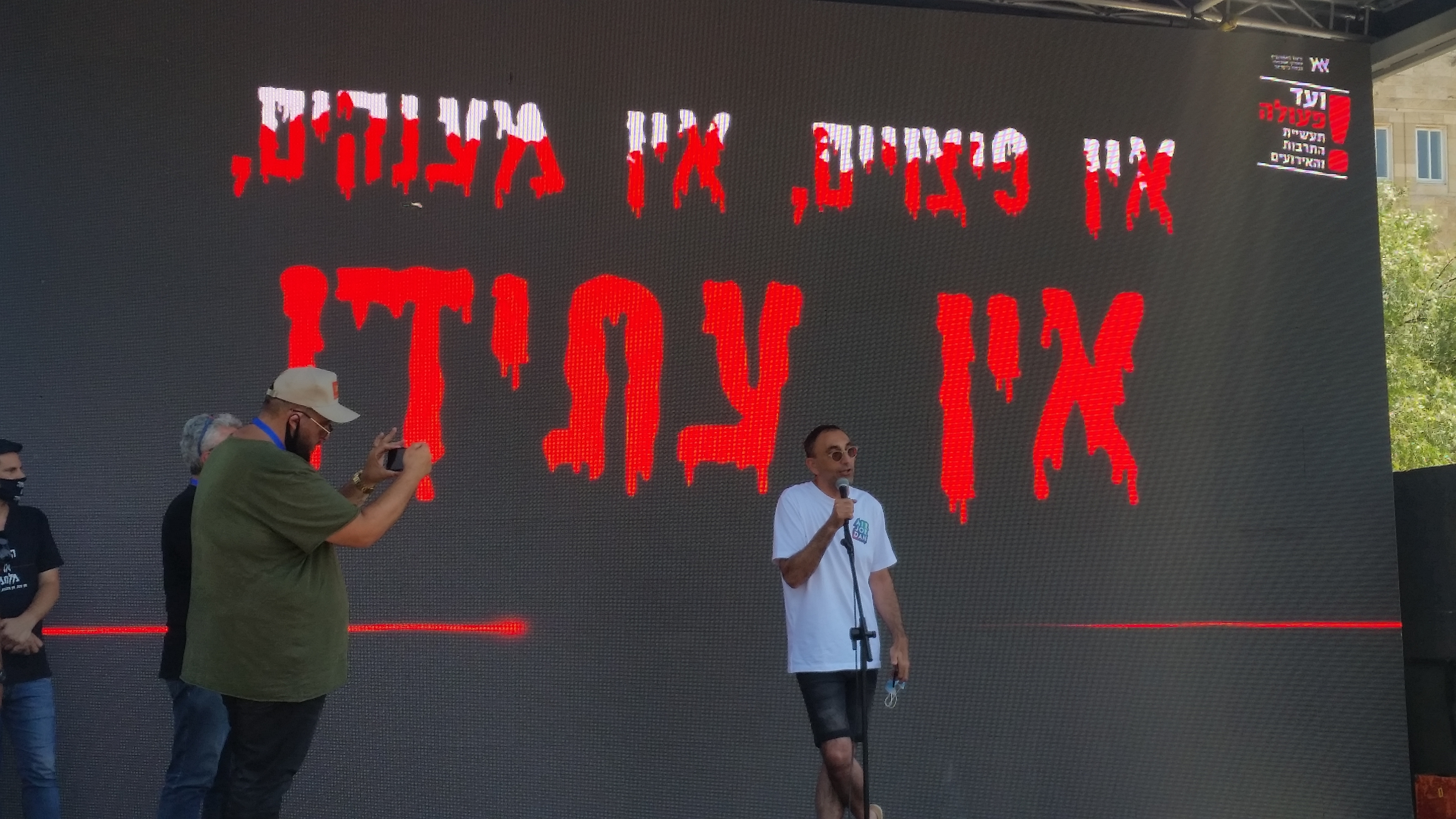 הפגנת תעשיית התרבות בירושלים